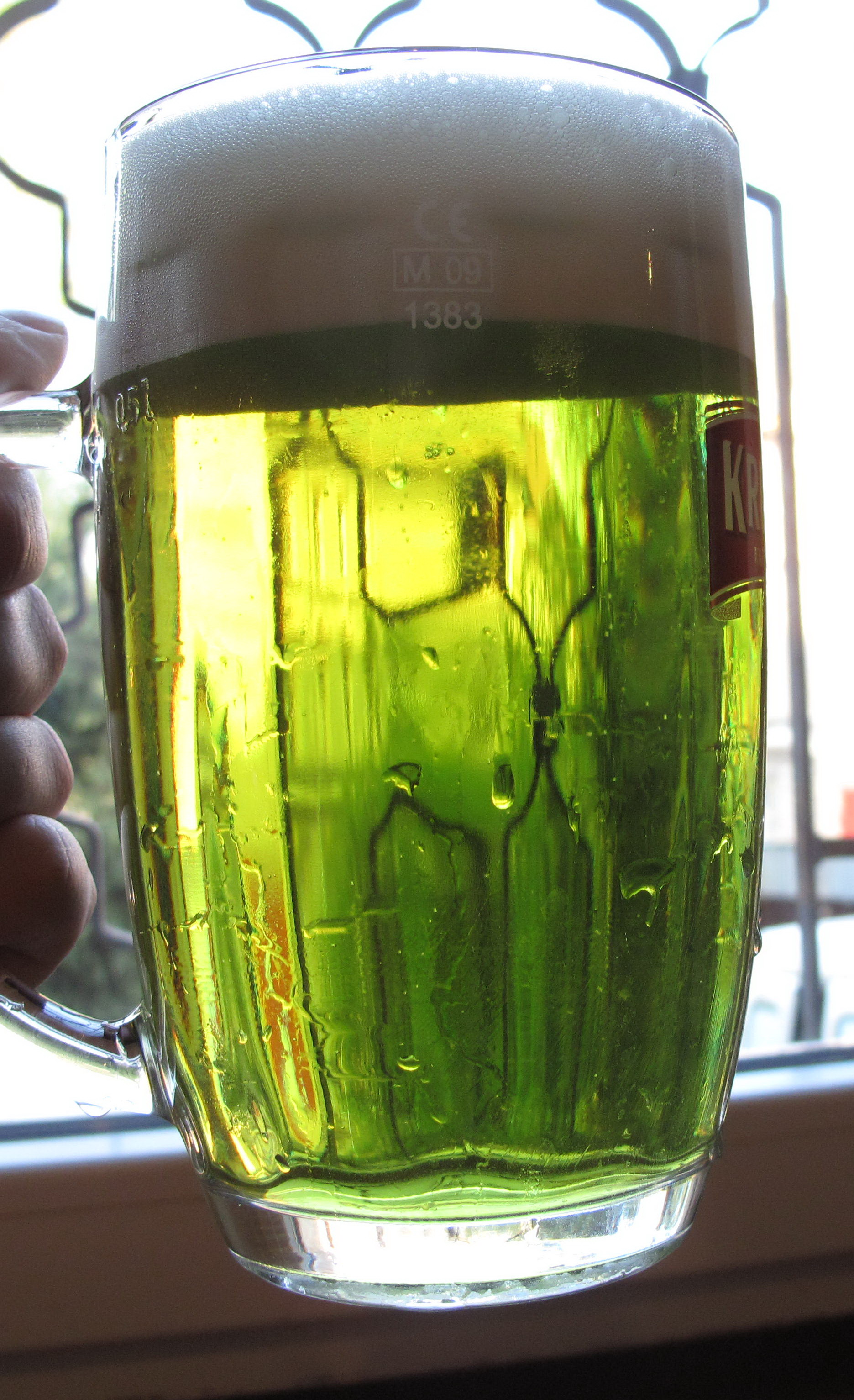 Zelená třináctka Starobrno